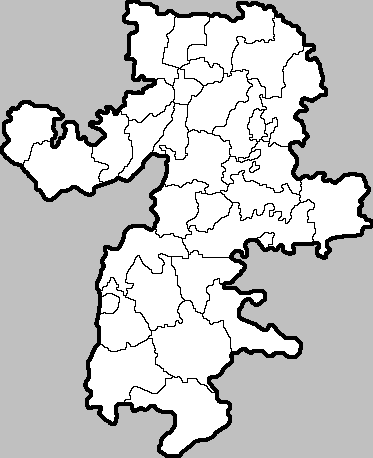 Позиционная карта Челябинской области